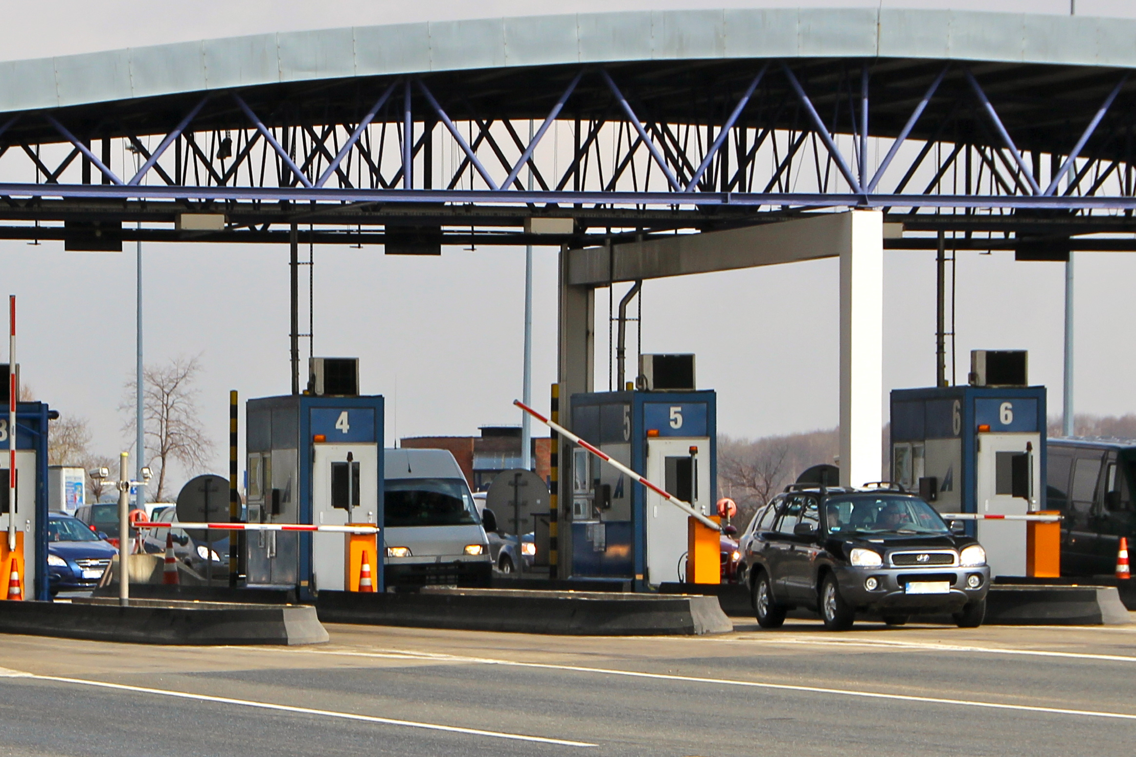 Punkt poboru opłat Balice na autostradzie A4.